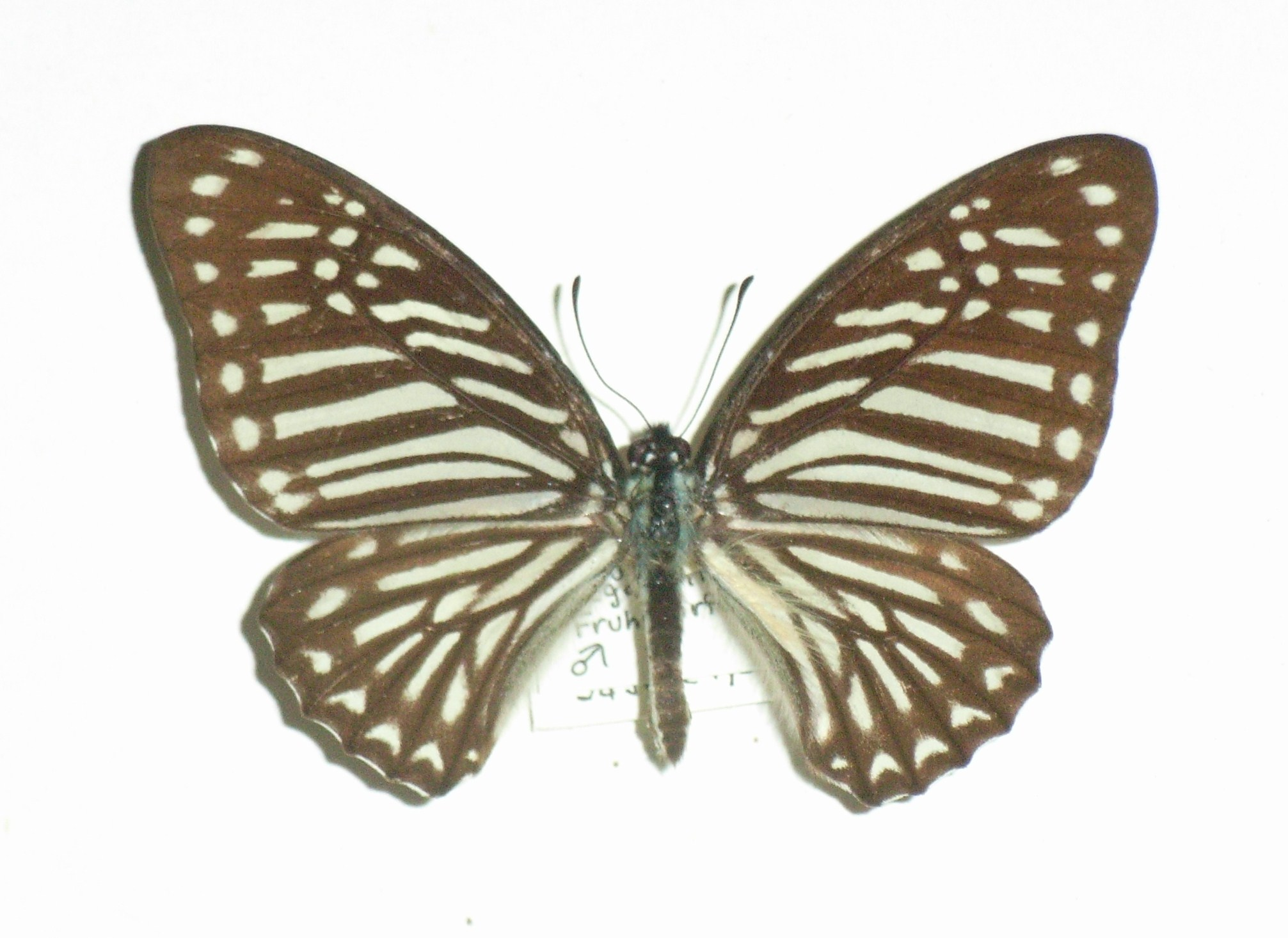 Pathysa megarus megapenthes